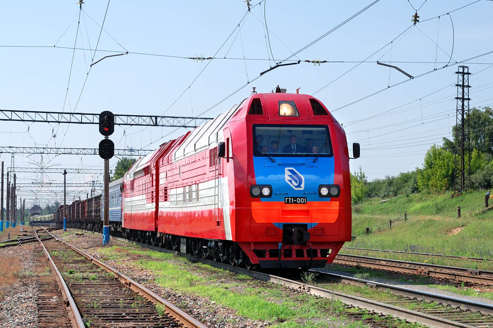 Газотурбовоз ГТ1-001 с поездом массой 3000 тонн на испытаниях, ст. Козелковская, Самарская область